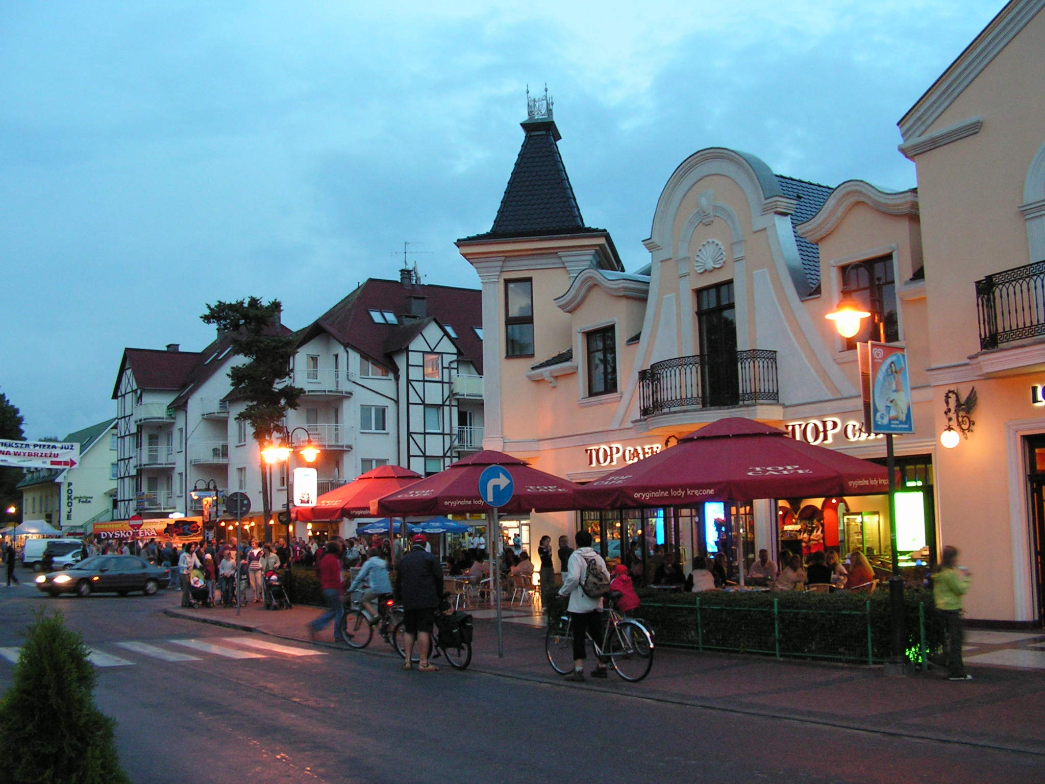 Centrum Pobierowa